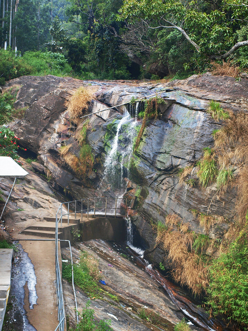 കരിമുട്ടി വെള്ളച്ചാട്ടം - മറയൂര്